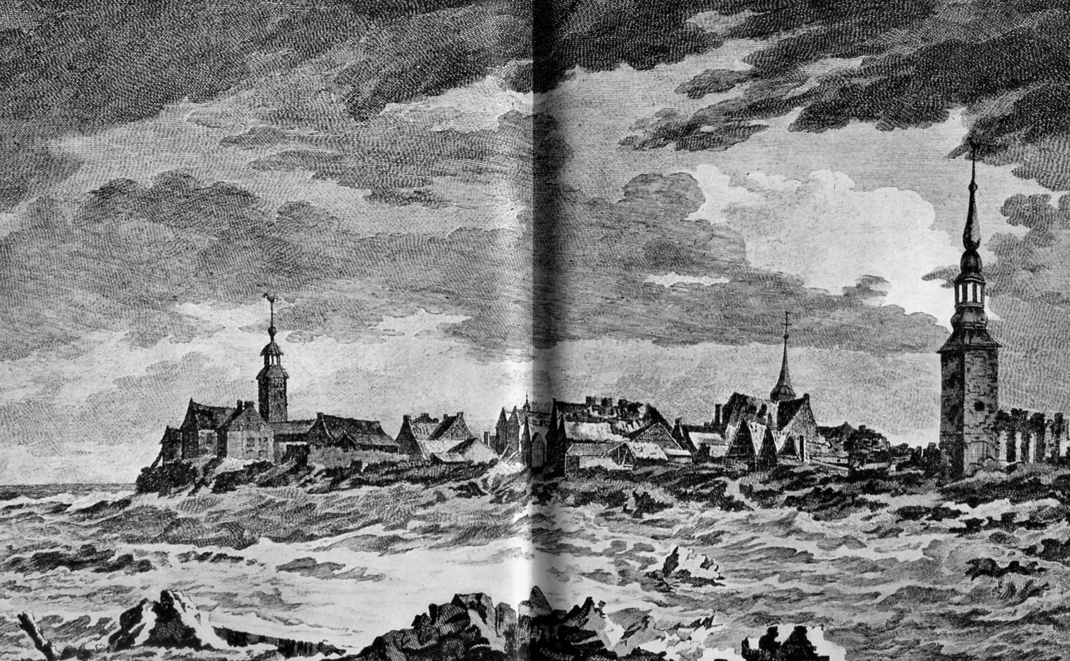 „Mulheim aan den Rhynna deszelfs Verwoesting door den zwaaren Ys-Gang in 1784“. Stahlstich der Eisflut des Jahres 1784